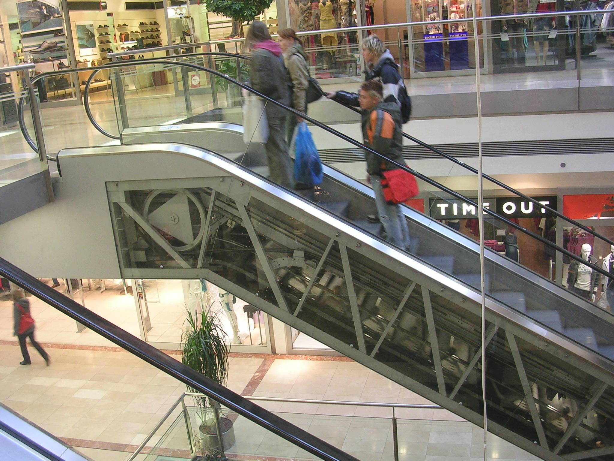 Eskalátor, Palác Flora, Praha